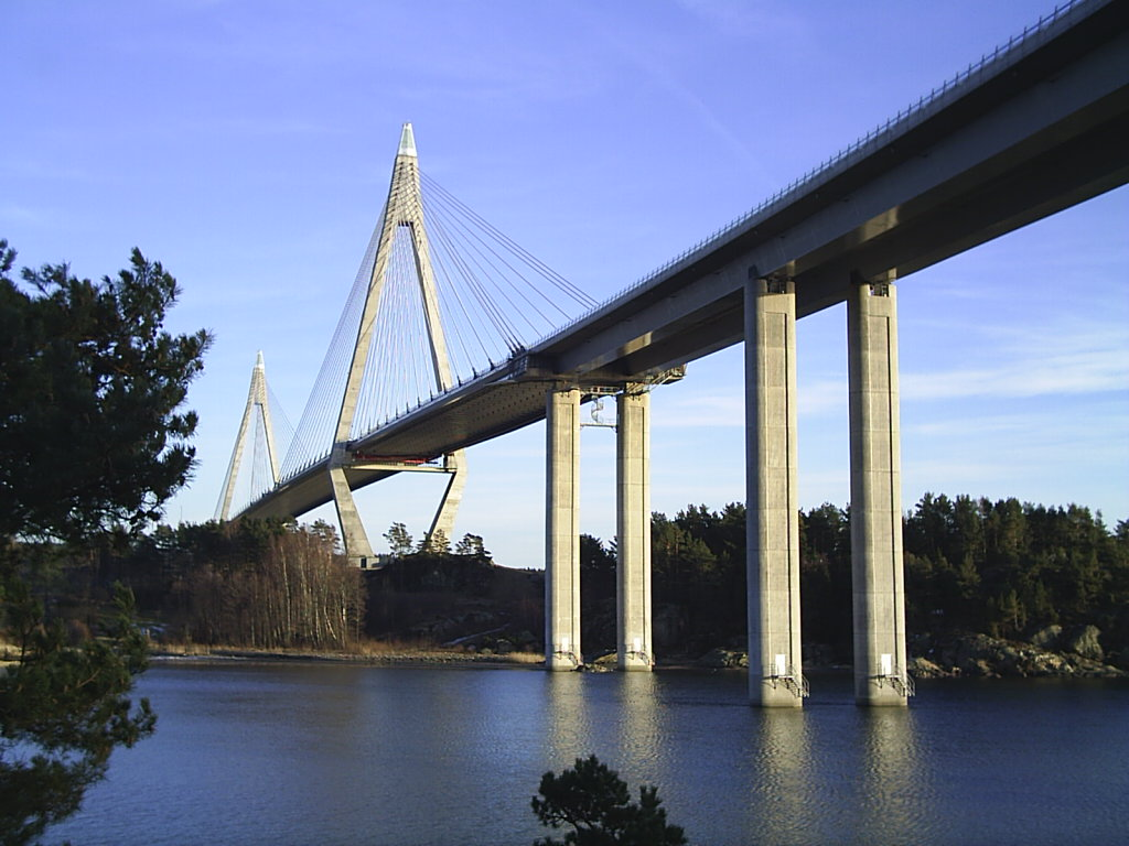 Uddevallabron, fotograferad 2005-03-26 av Tubaist 29 april 2005 kl.01.29 Tubaist 1024x768 (144505 bytes) ( Uddevallabron , fotograferad 2005-03-26 av ~~~ GFDL )